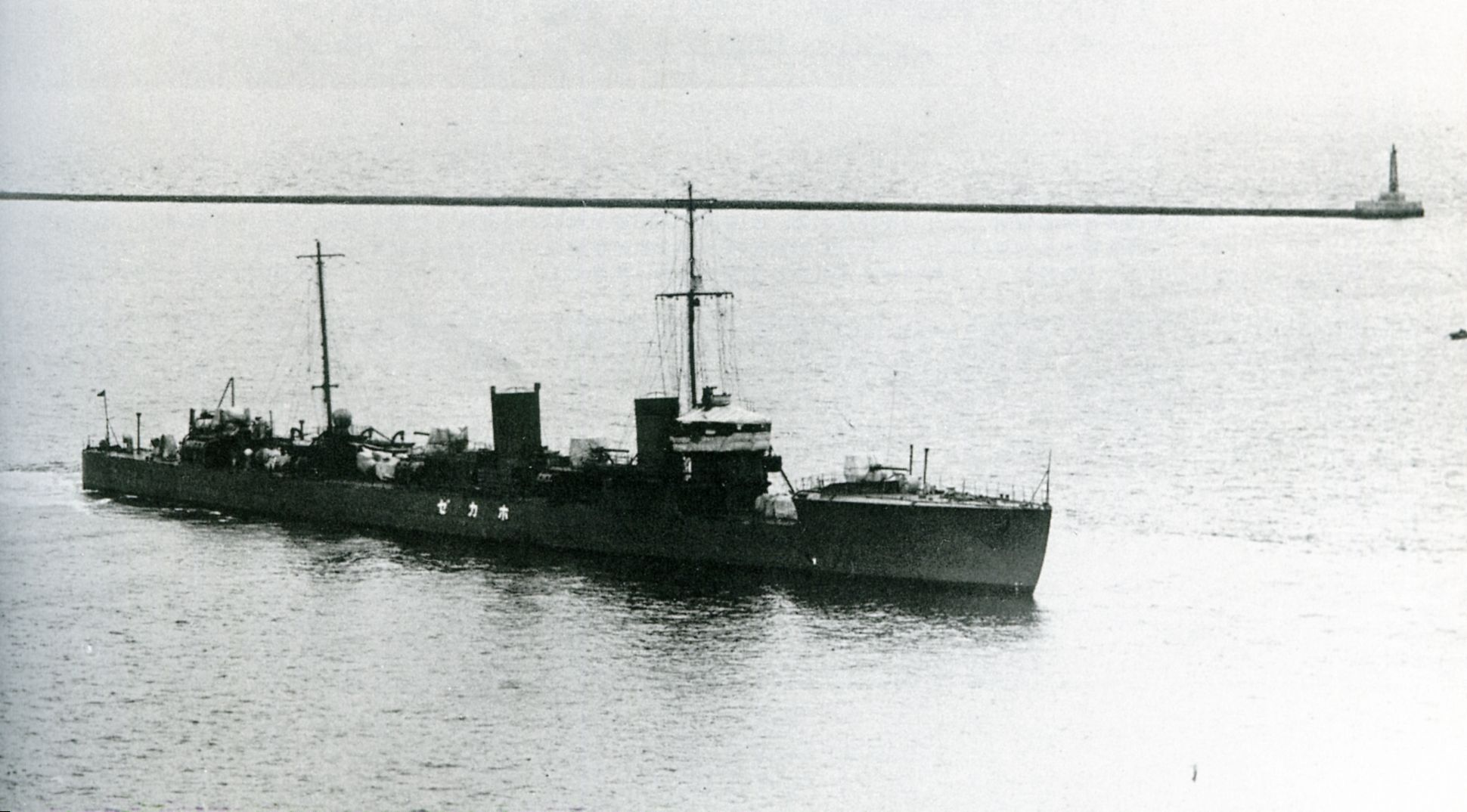 Imperial Japanese Navy destroyer Hokaze at Yokosuka.